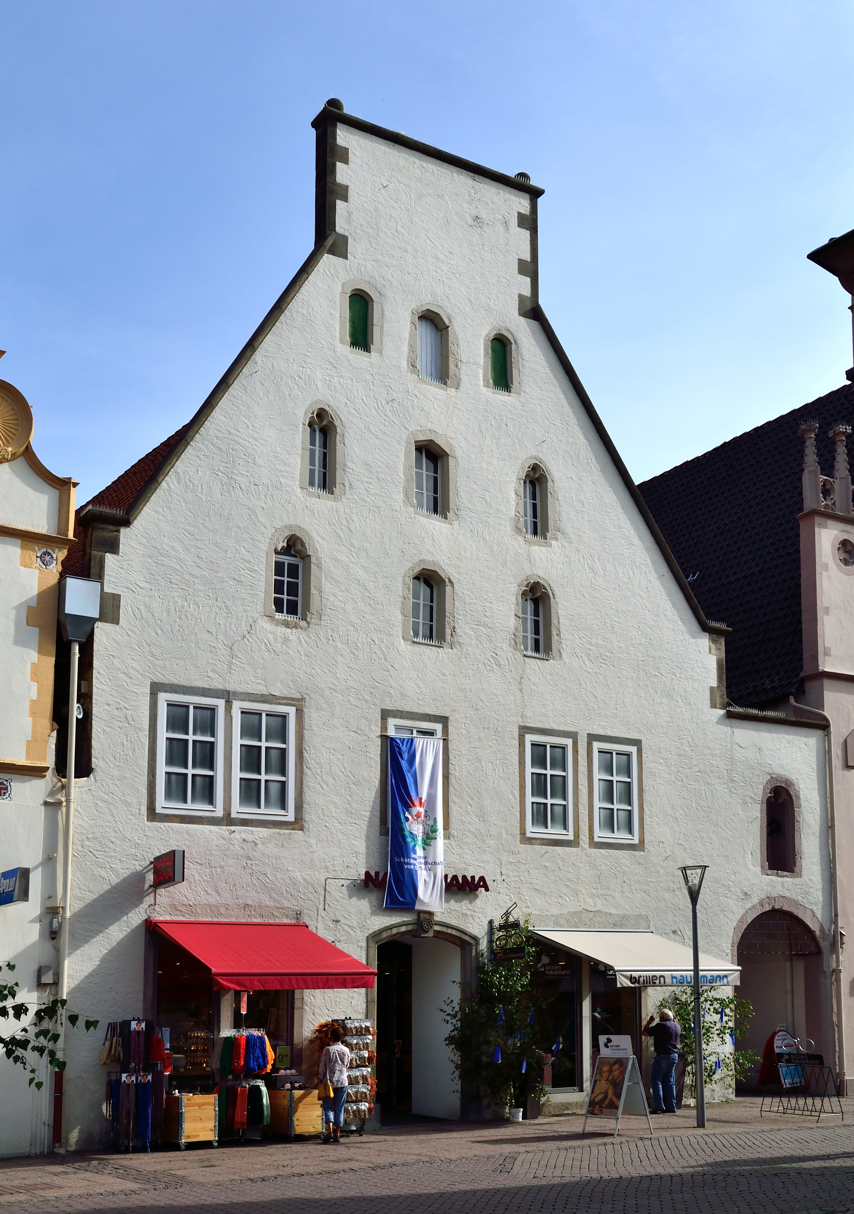 This is a photograph of an architectural monument.It is on the list of cultural monuments of Lemgo spätgotisches Steingiebelhaus, um 1500